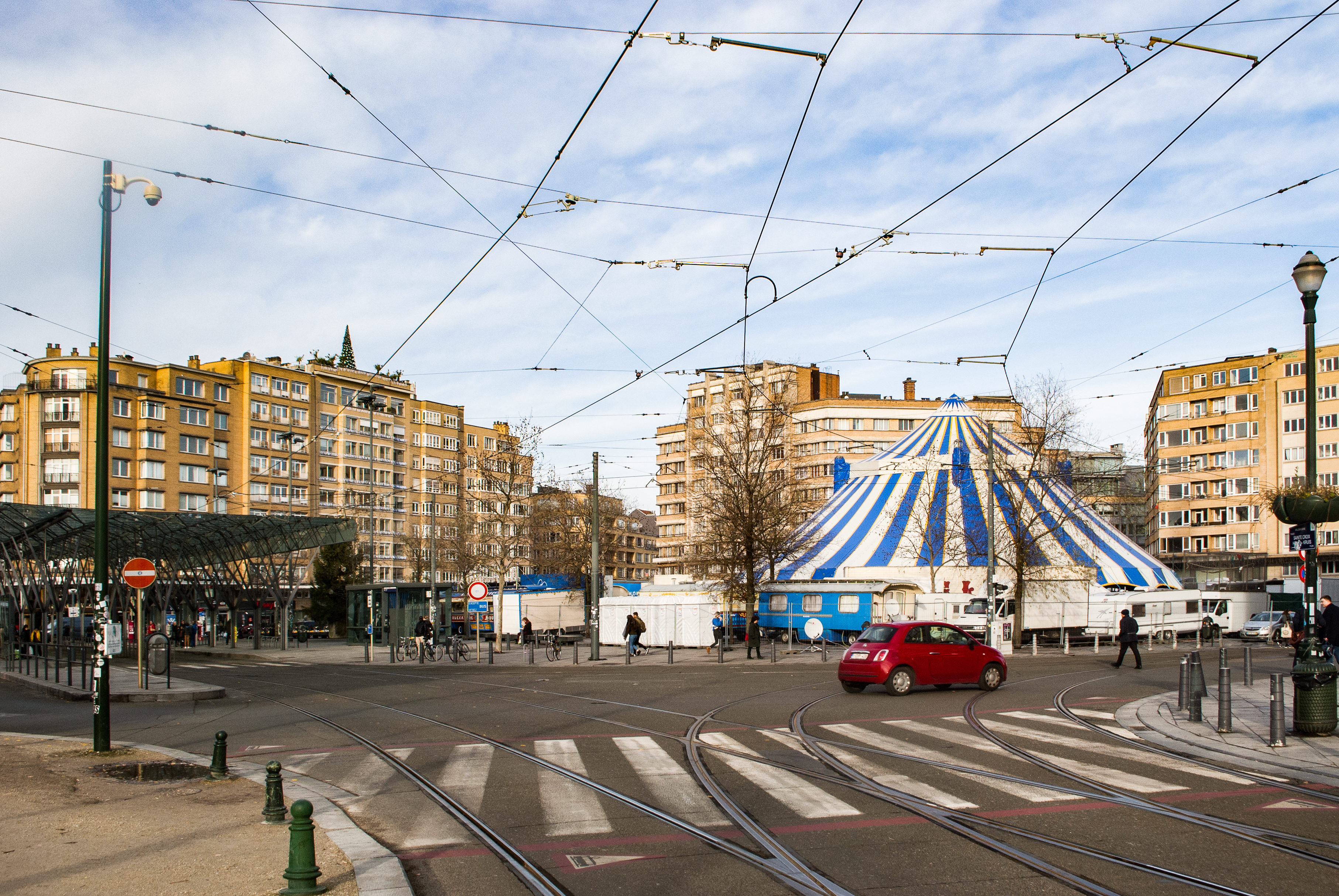 Place Flagey à Bruxelles